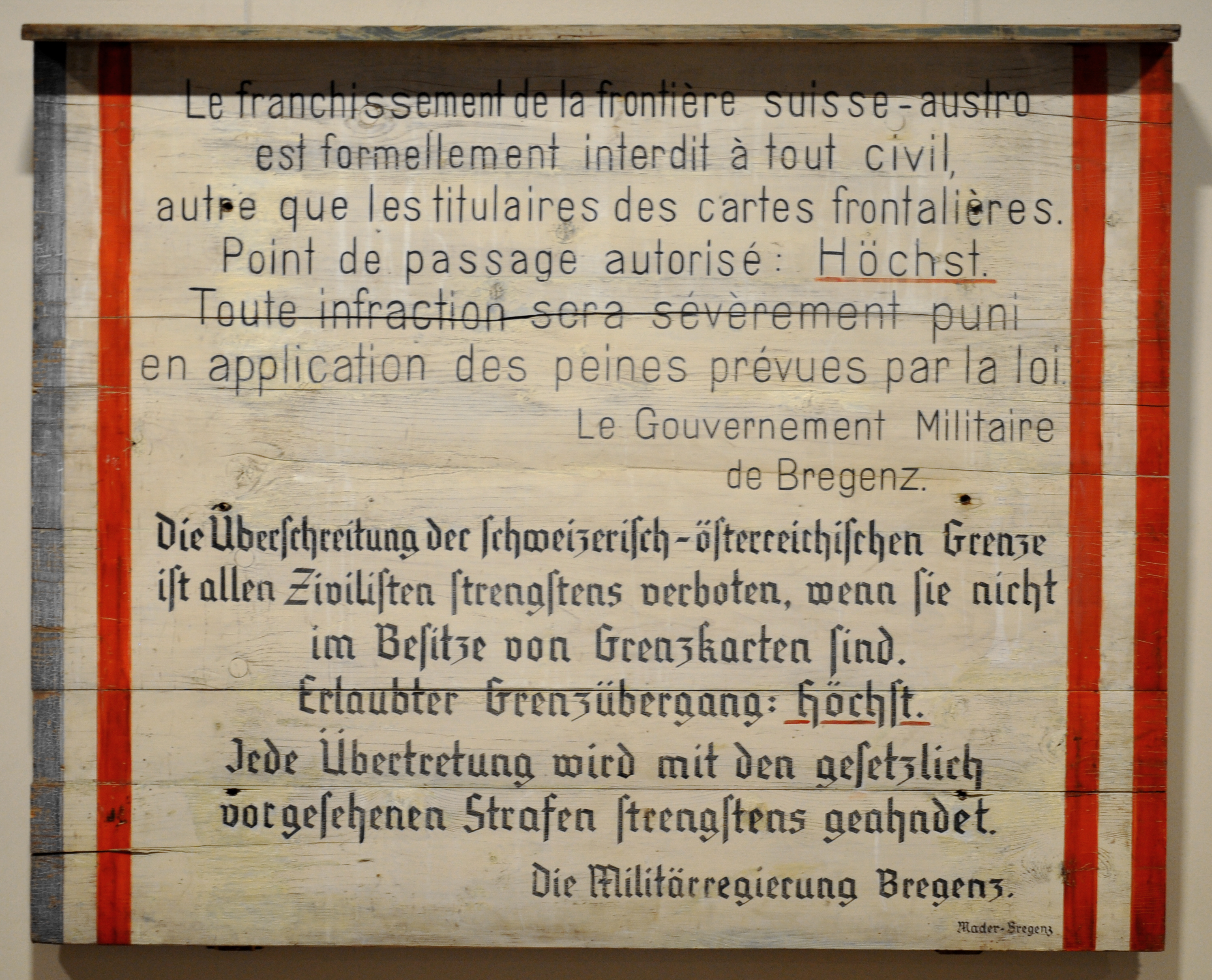 Hinweisschild an der schweizerisch-österreichischen Grenze zur Zeit der französischen Besatzung; Standort unbekannt; 1945–1955 Bregenz, Vorarlberg Museum; Leihgabe des Stadtarchivs Bregenz Vorarlberg museum Native namevorarlberg museumLocationBregenz, Vorarlberg, AustriaCoordinates47° 30′ 15.84″ N, 9° 44′ 48.01″ E Established1857Web pageVorarlberg Museum websiteAuthority control : Q2533480 VIAF: 124303291 ISNI: 0000 0001 2242 622X LCCN: n50051186 GND: 18871-2 SUDOC: 030717523 WorldCat institution QS:P195,Q2533480